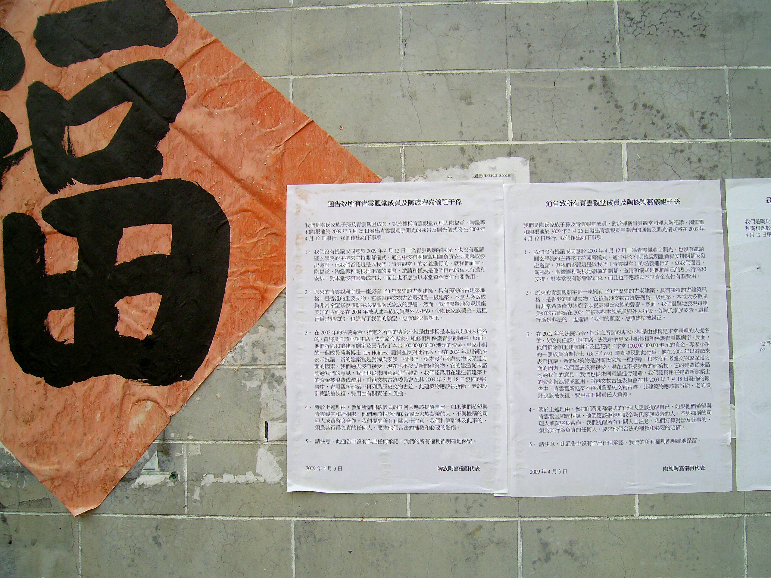 中文（香港）: 屯子圍三聖宮